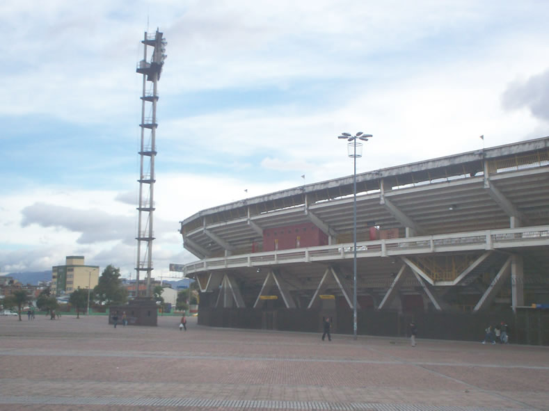 Estadio El Campín en Bogotá Foto tomada por mi. Stadium El Campín in Bogotá